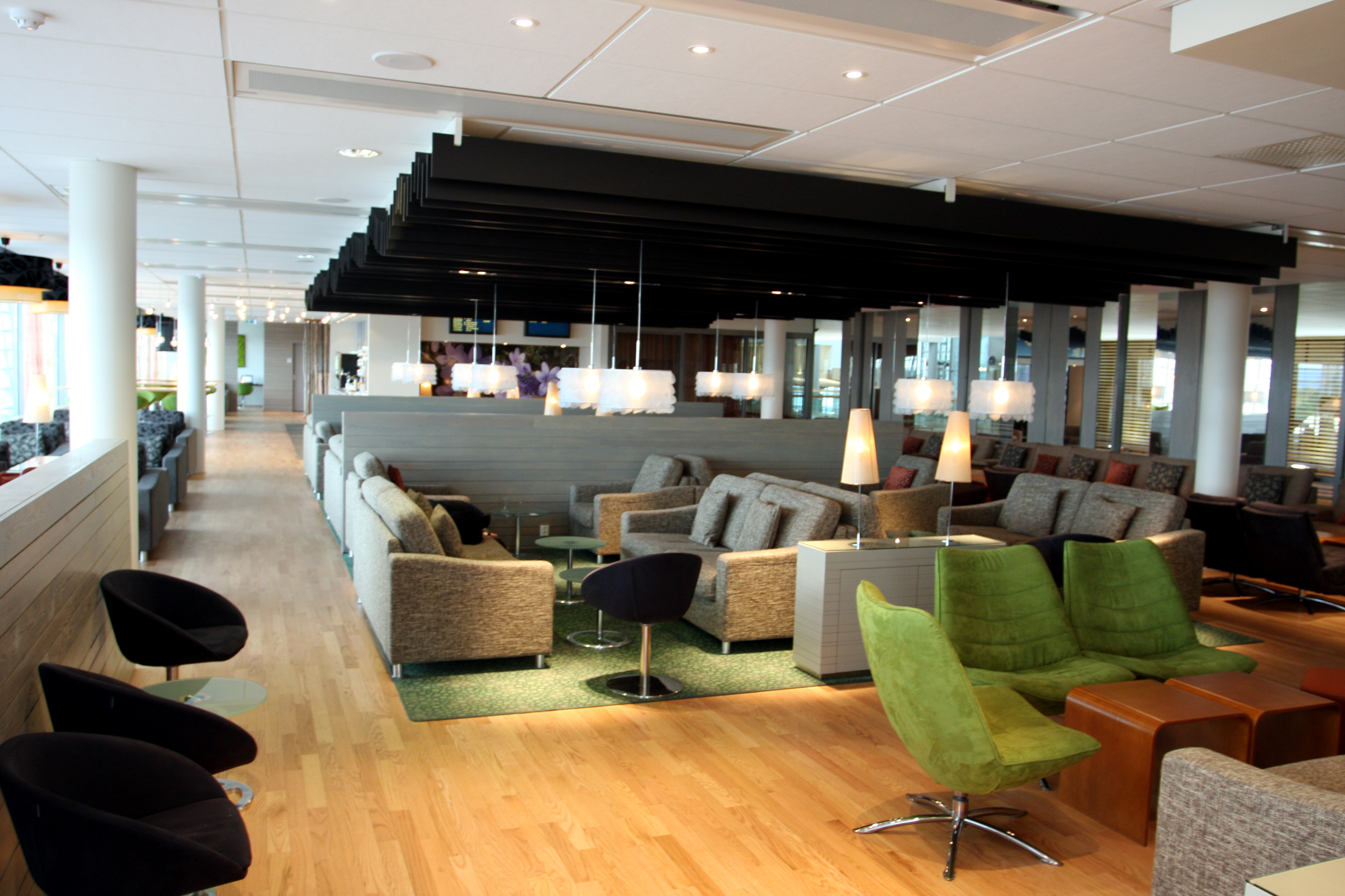 Oslo Lounge - Gardermoen Airport